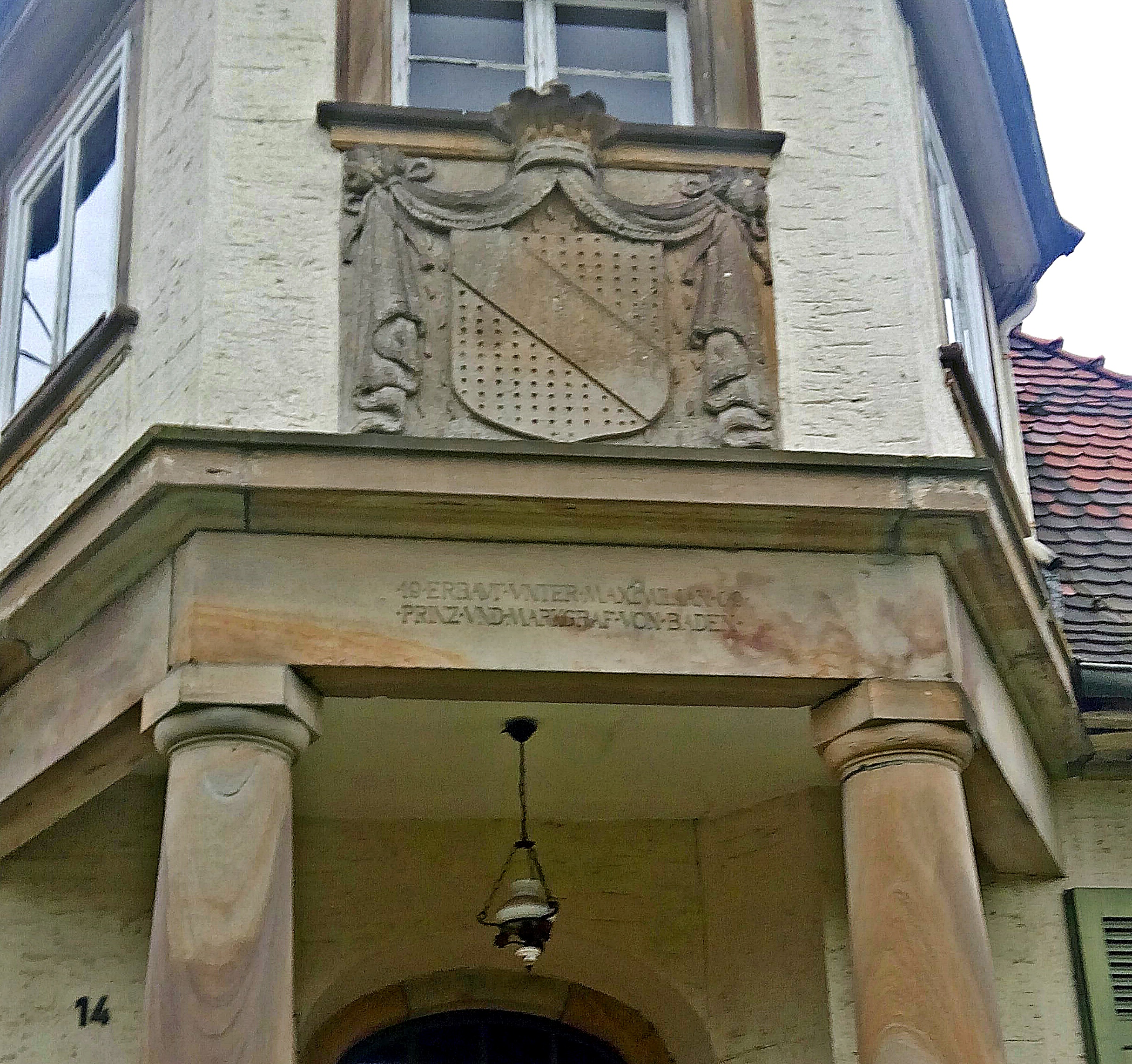 Kirschgartshausen Wappenstein und Inschrift Haus Nr 14, ERBAUT UNTER MAXIMILIAN PRINZ UND MARKGRAF VON BADEN · 1909